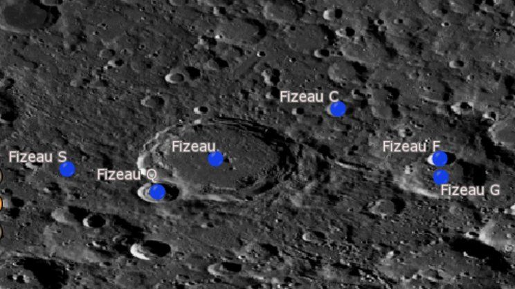 Cráter lunar Fizeau. Cráteres satélite. (Imagen LROC)